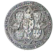 Margaret III, Countess of Flanders